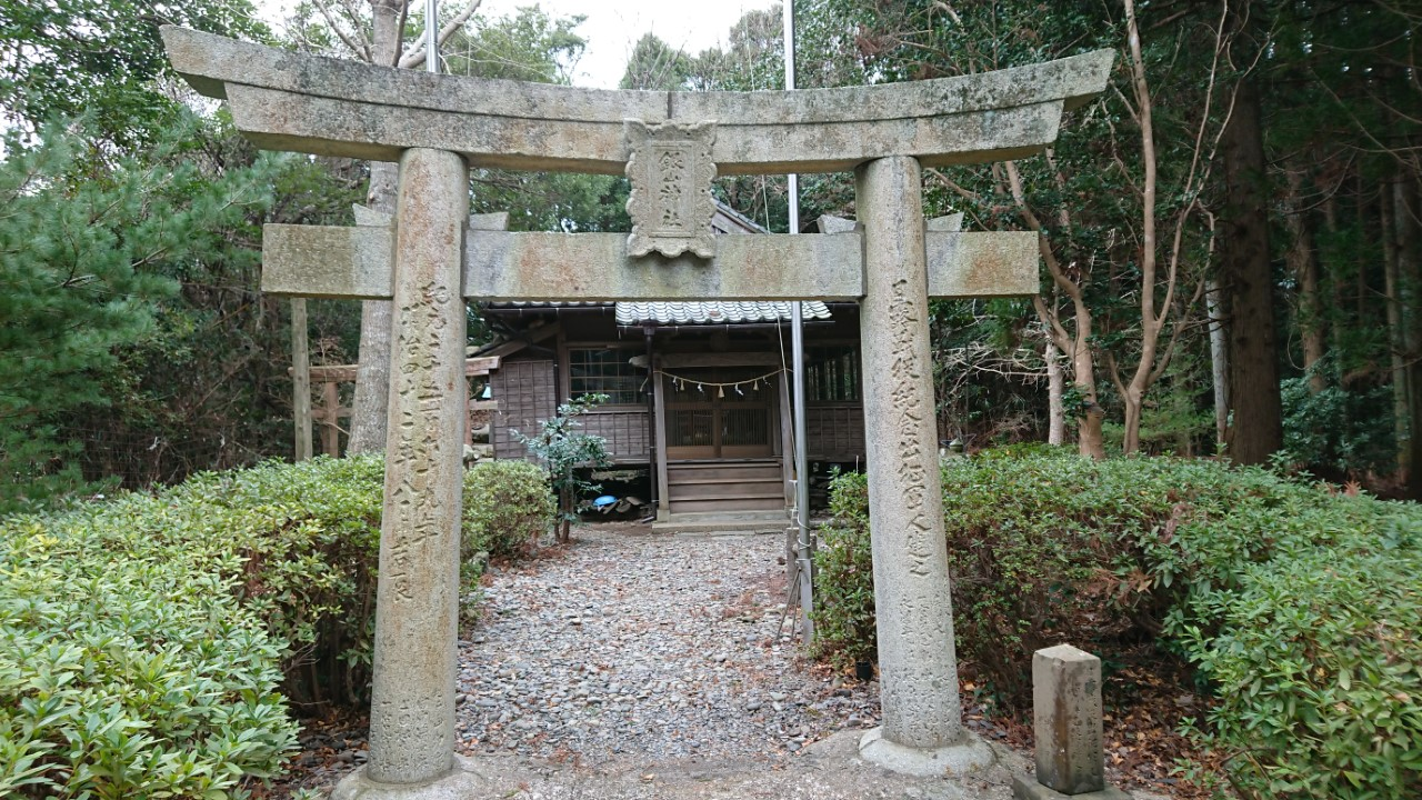 長崎県対馬市厳原町樫根にある神社。